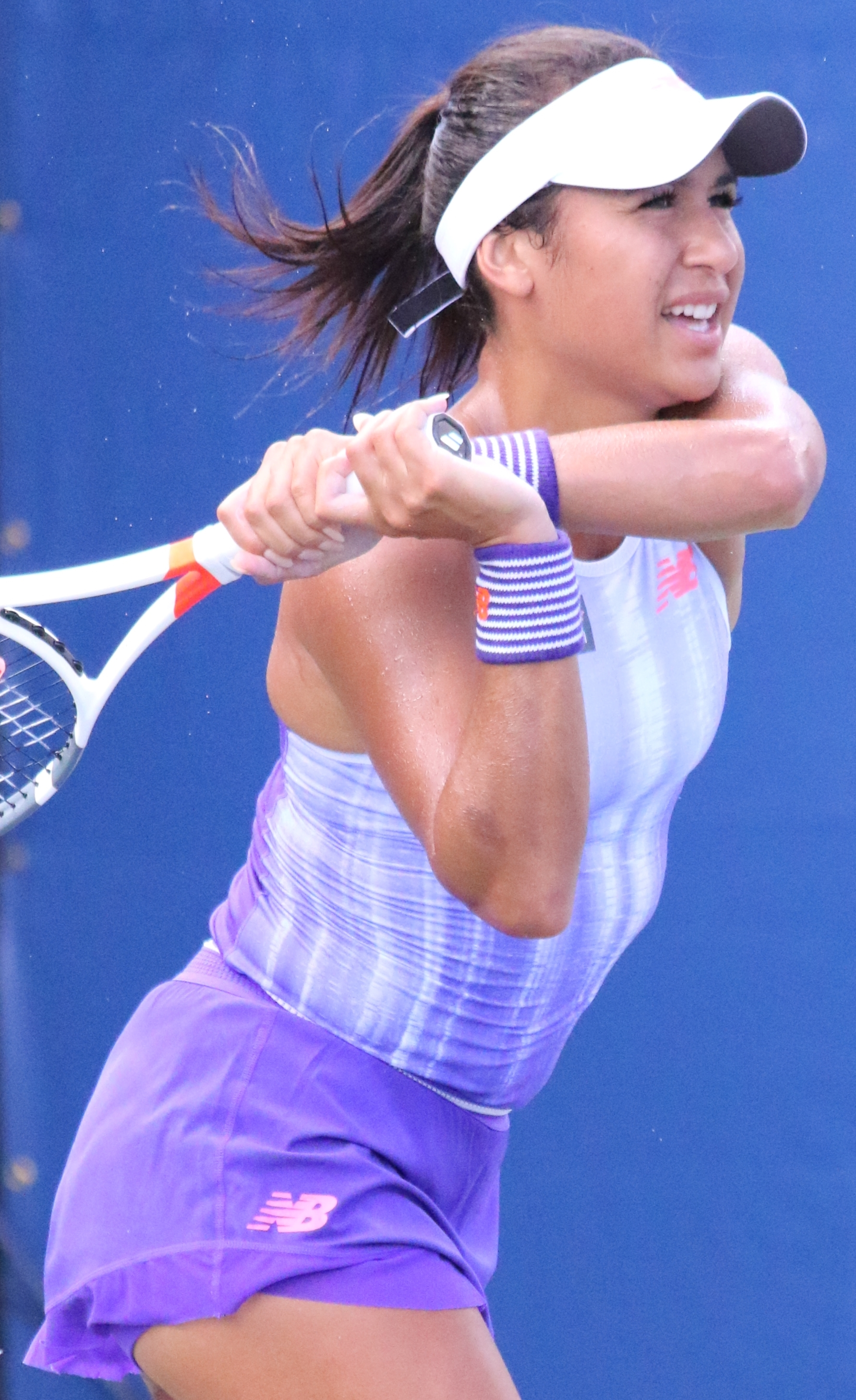 Watson US16 (11)